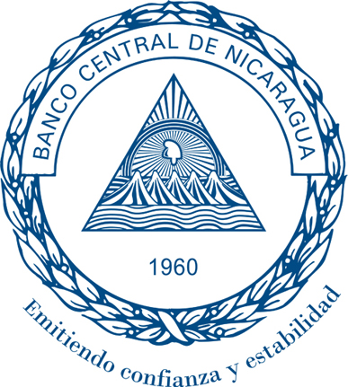 Logo Banco Central de Nicaragua